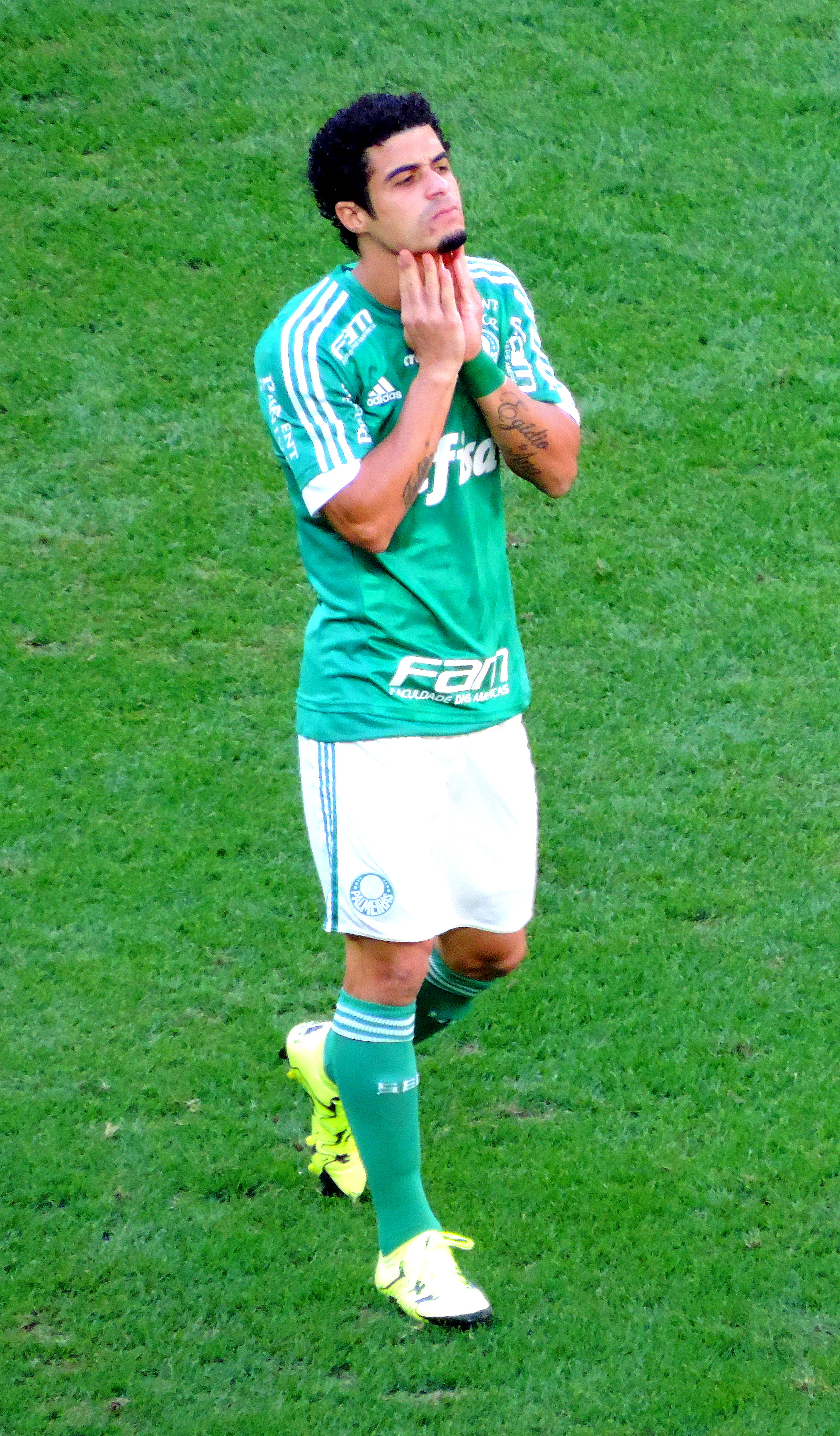 Egídio. Foto: Roberto Sabino